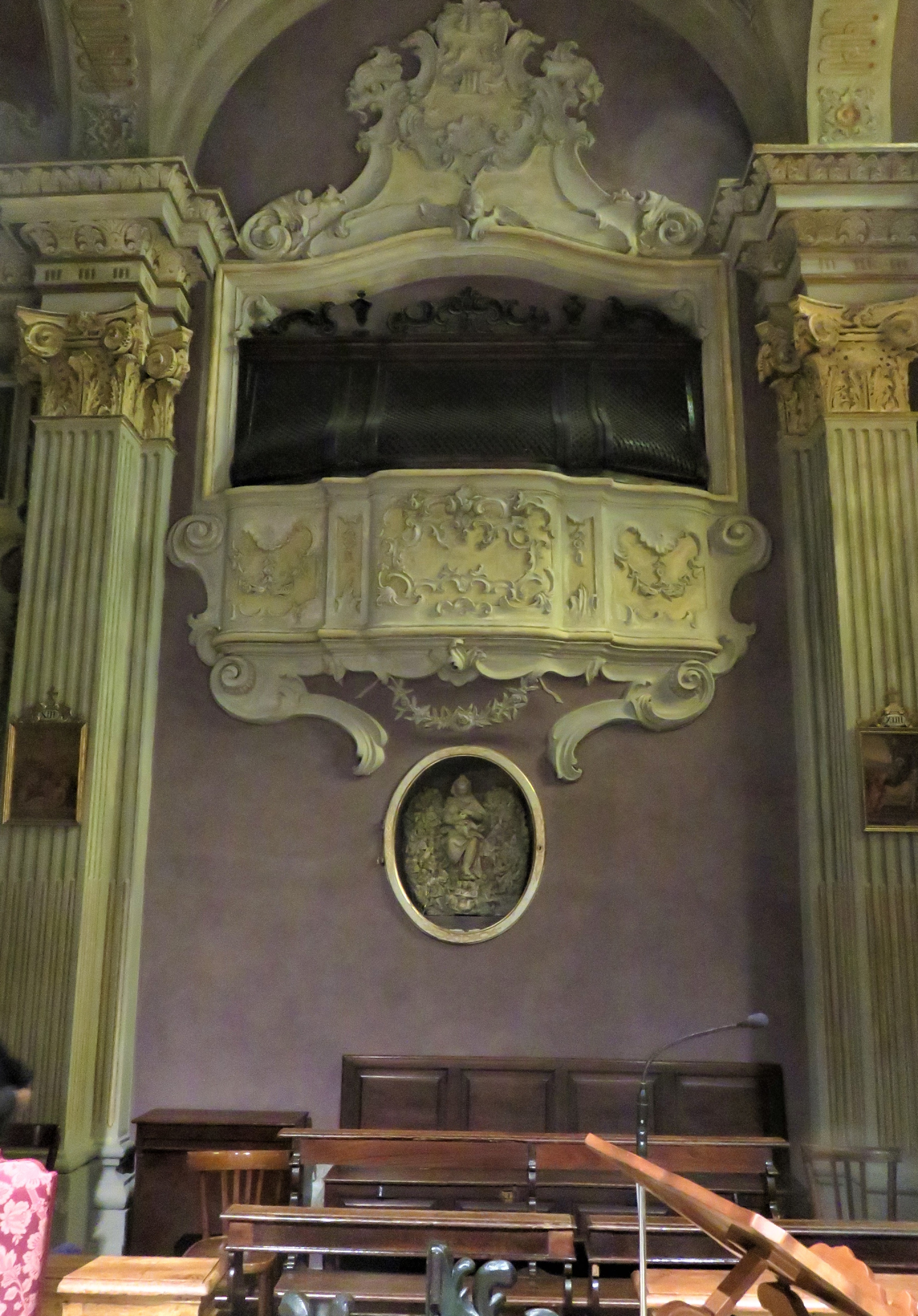 Carpi. Chiesa del Santissimo Crocifisso. Cantoria sinistra con, sotto, Madonna degli angeli opera di Antonio Begarelli.